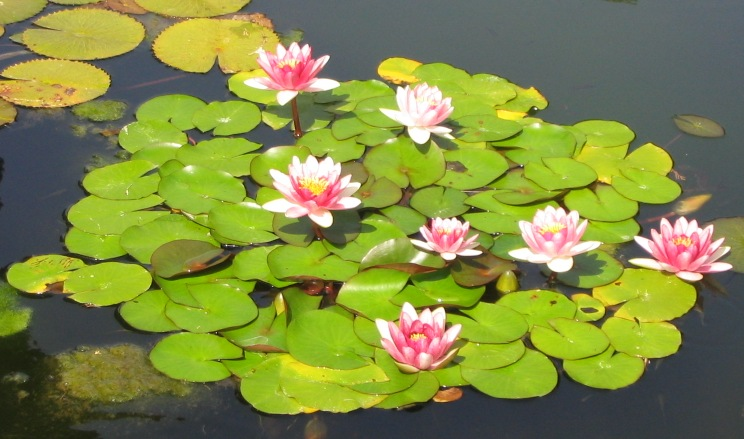 Nenúfar con flor rosa.